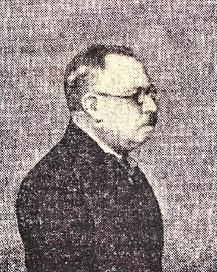 Photographie d'Émile Bohuon, maire et conseiller général de Combourg de 1919 à 1938.